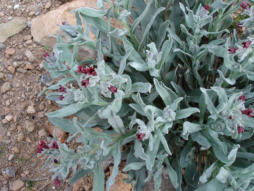 Pardoglossum cheirifolium subsp. cheirifolium(cynoglosse à feuilles de giroflée) Photo prise à Salses-le-Château